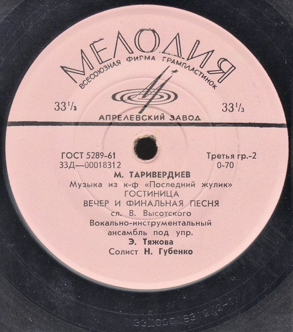 Изображение миньона фирмы Мелодия на музыку Таривердиева и слова Владимира Высоцкого. Мелодия – 33Д--00018311, Мелодия – 33Д--00018312